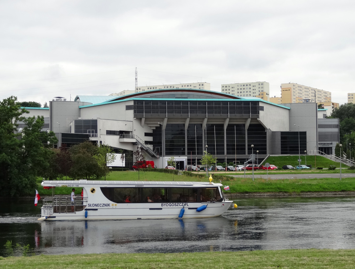 Hala widowiskowo-sportowa "Łuczniczka" w Bydgoszczy - widok od strony Brdy